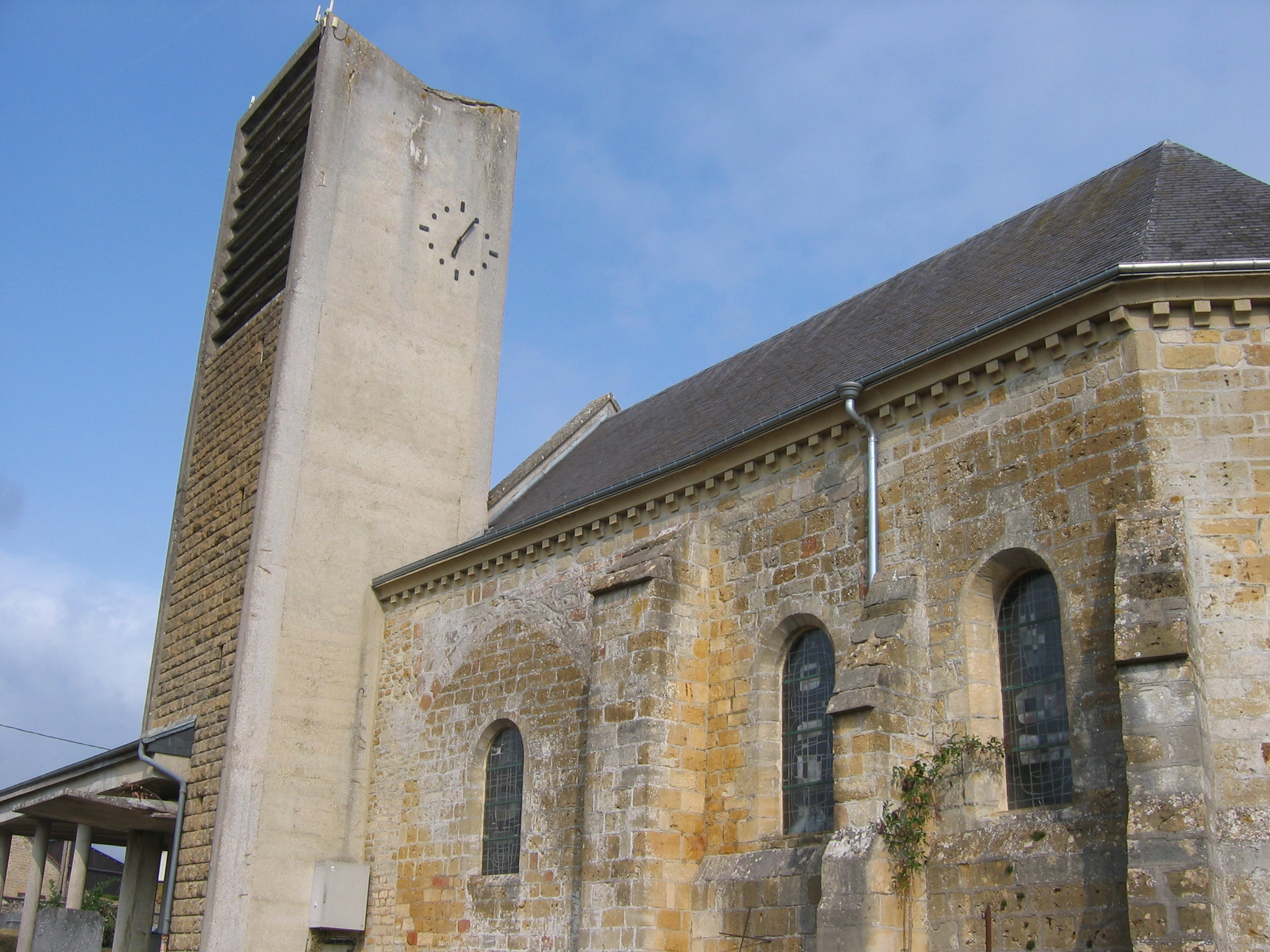 Eglise de La Besace - Ardennes